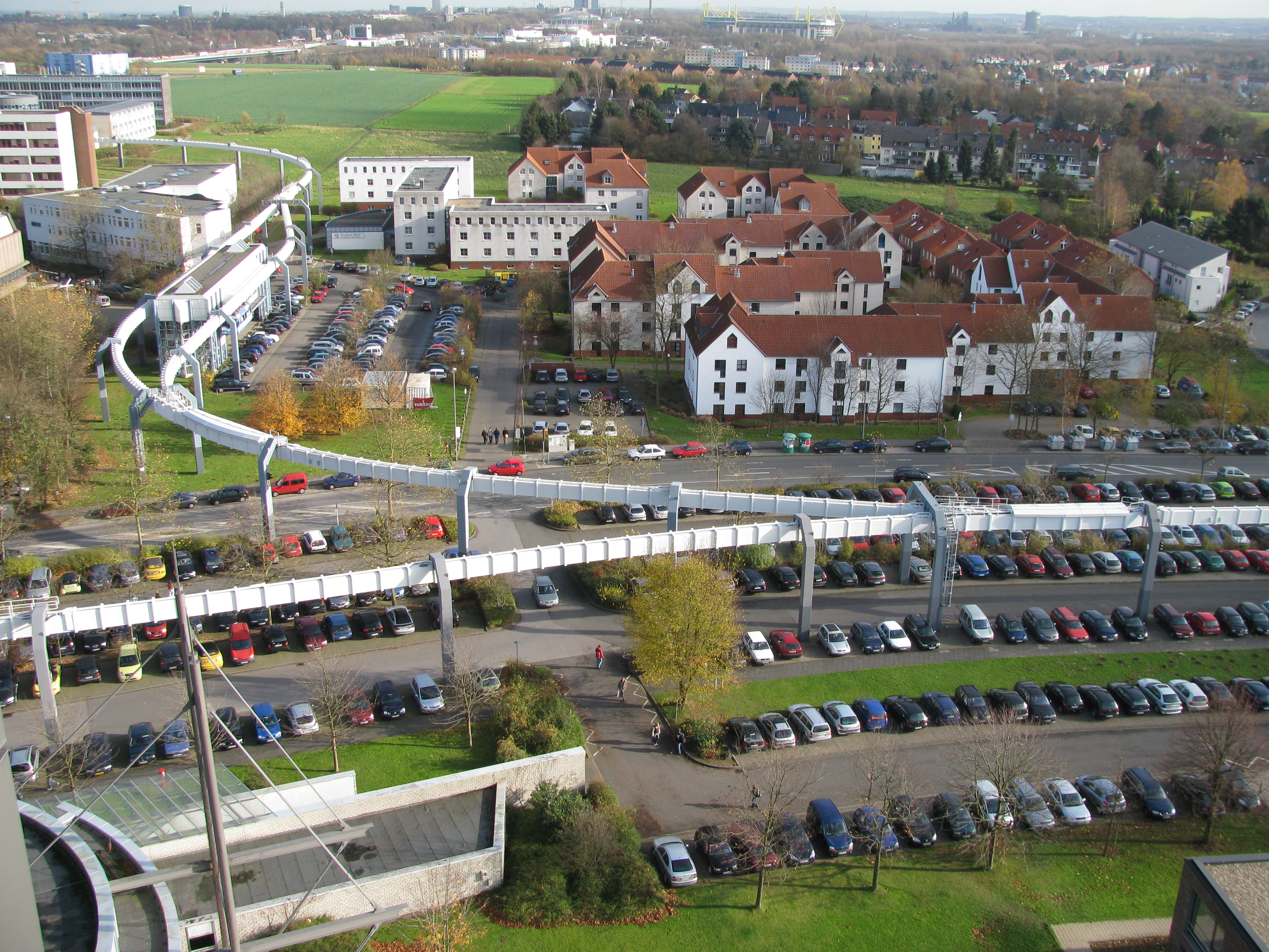 Studentendorf, Wohnheim der Uni Dortmund